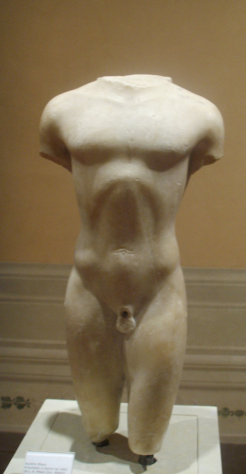 Museo_archeologico_di_Firenze Apollino_Milani_520-510_a.c. museum in Florence